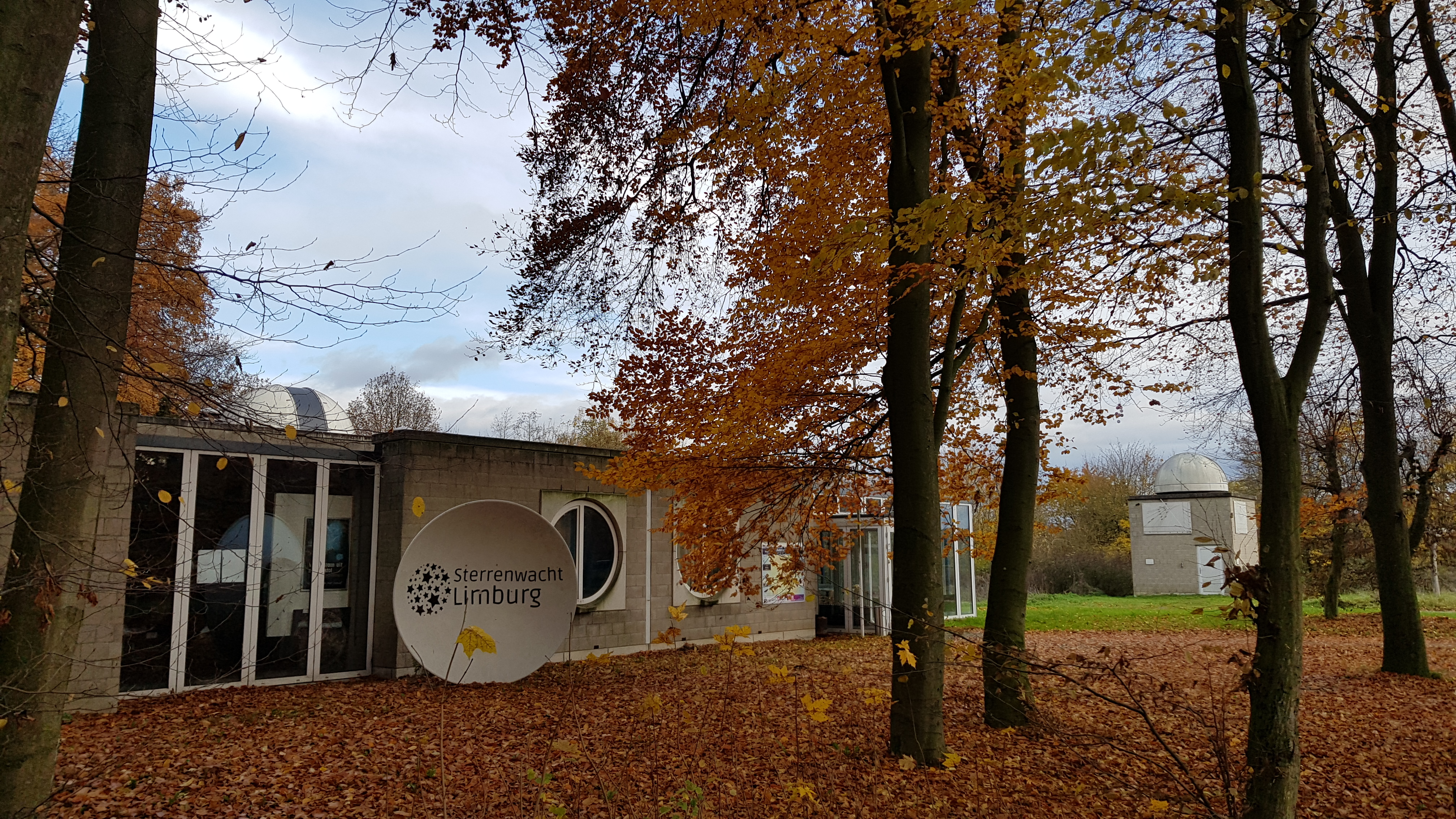 Sterrenwacht Limburg op de Brunssummerheide, Heerlen, Nederland